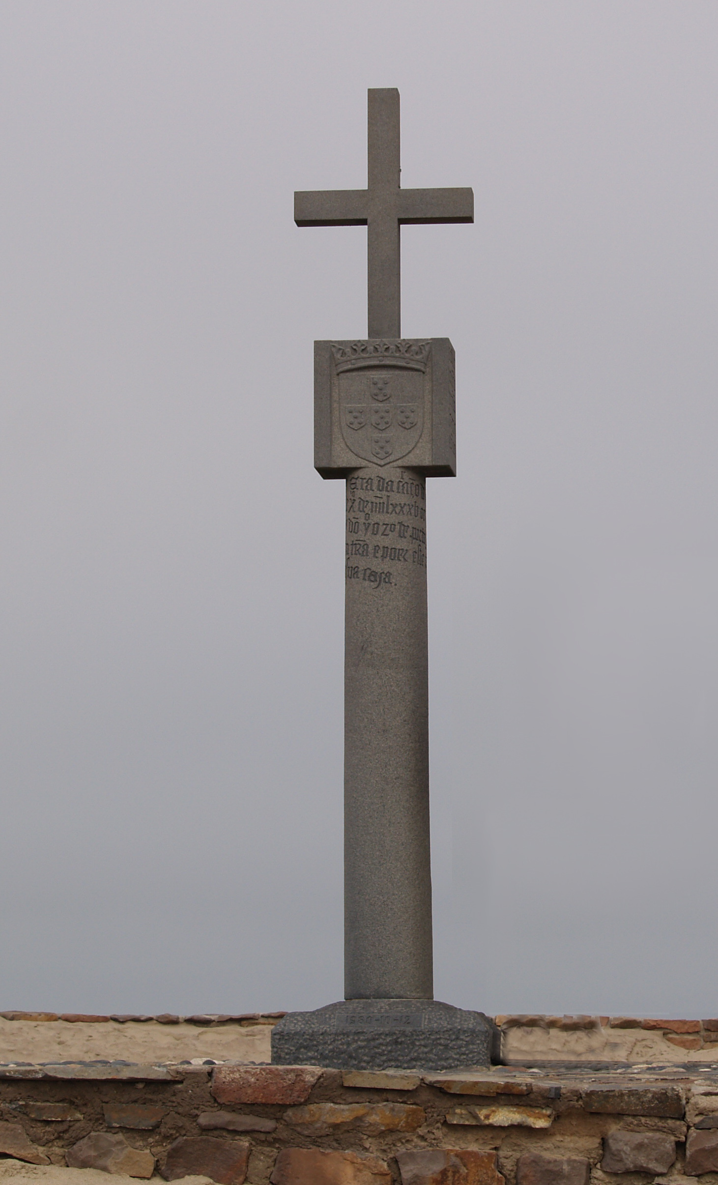 Namibia Cape Cross Padrão de Diogo Cão